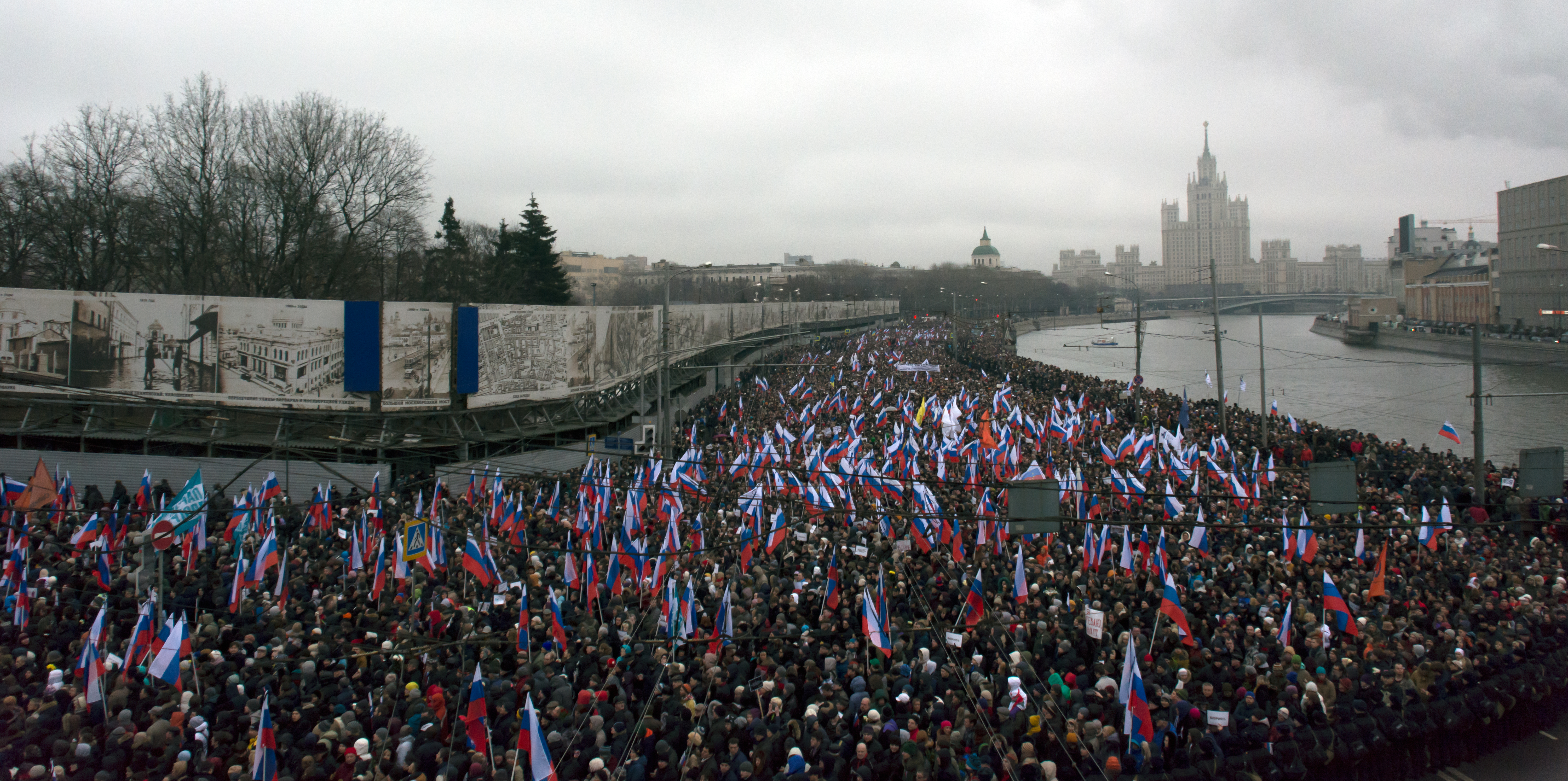 Марш памяти Бориса Немцова